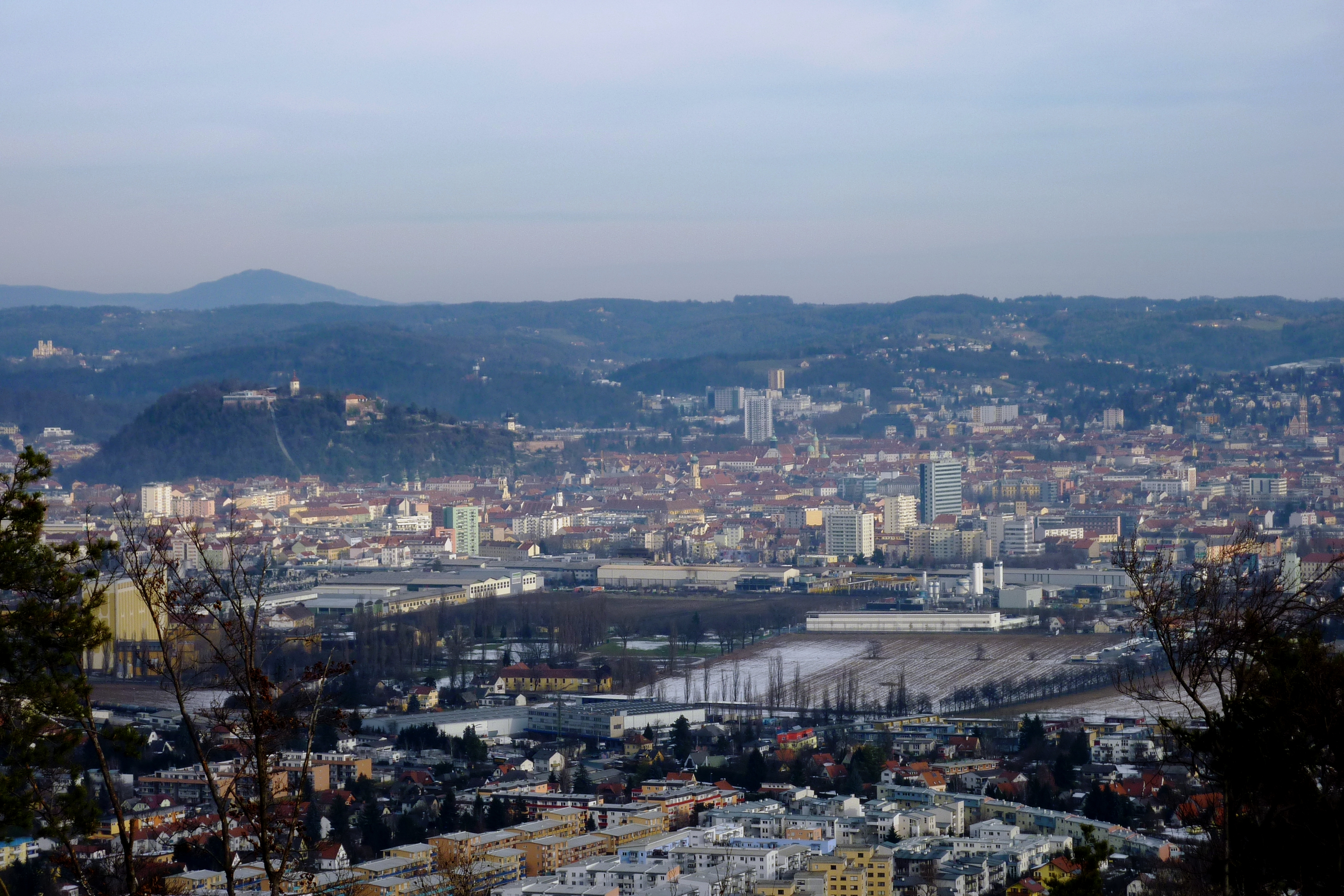 Ausblick auf die Stadt Graz mit dem Schloßberg, von der Kirche St. Johann und Paul. Graz, Österreich, Europa